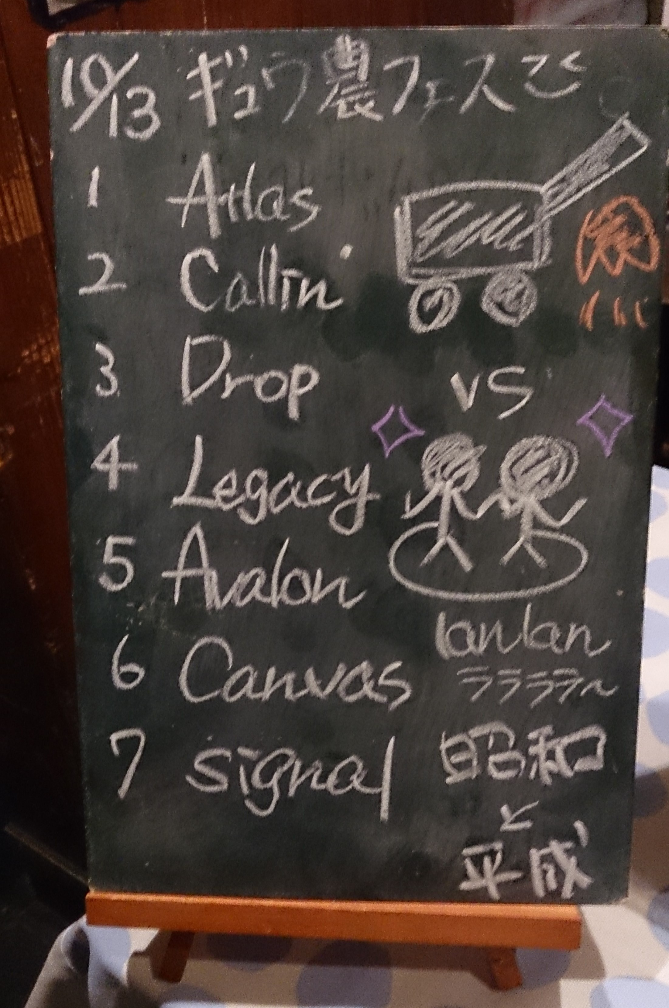 amiinAセトリボード(20171013(1))